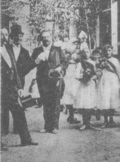 Von links nach rechts: Hauptmann a. D. Emil Mohl, Ludwig Eisenlohr, Kommerzienrat Rustige. Bei der Feier des Regierungsjubiläums König Karls am 9. Juni 1889 auf der Silberburg in Stuttgart.